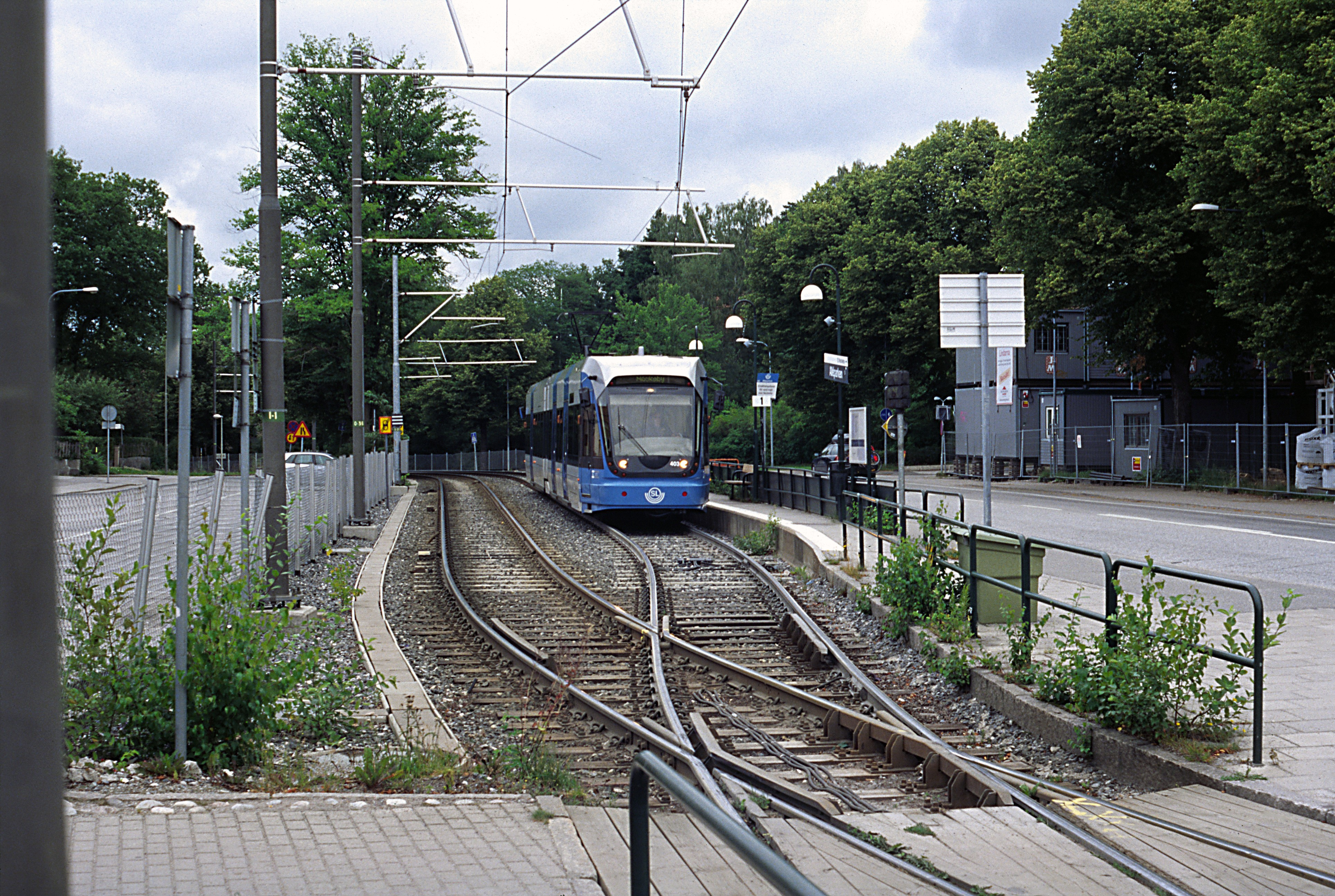 Nockebybanan, Zug nach Nockeby vor dem Wechsel in den Rechtsfahrbetrieb.